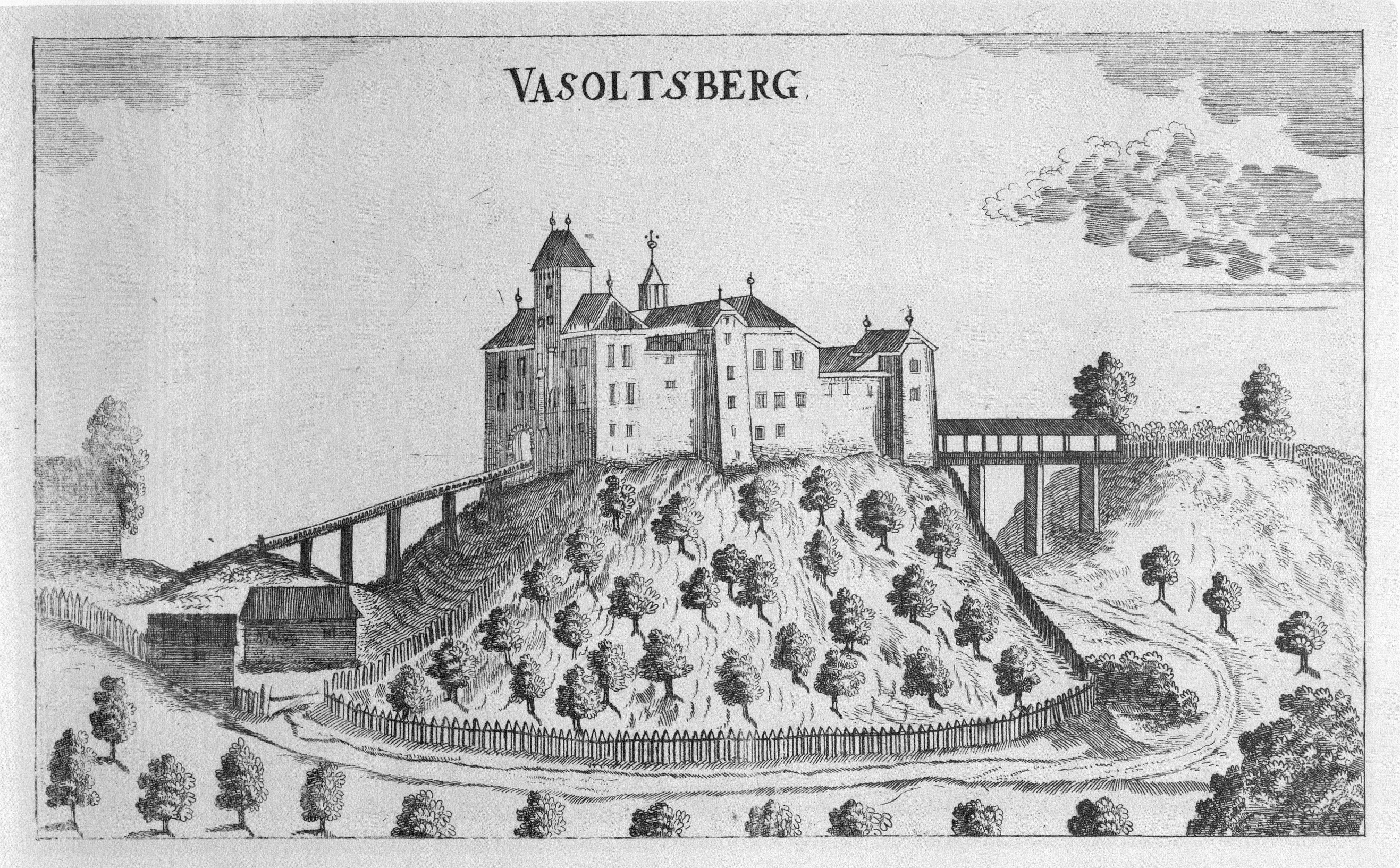 G. M. Vischers Käyserlichen Geographi, Topographia Ducatus Stiriae, Das ist: Eigentliche Delineation / und Abbildung aller Städte / Schlösser / Marcktfleck / Lustgärten / Probsteyen / Stiffter / Clöster und Kirchen / so es sich im Herzogthumb Steyrmarck befinden; Und anjetzo Umb einen billichen Preyß zu finden seynd Bey Johann Bitsch Universitäts Buchhandlern / Auff dem Juden=Platz bey der guldenen Saulen. Graz 1681 Die Nummerierung der Dateien folgt der alphabetischen Reihung der Ortsnamen und entspricht nicht dem Vischer-Register